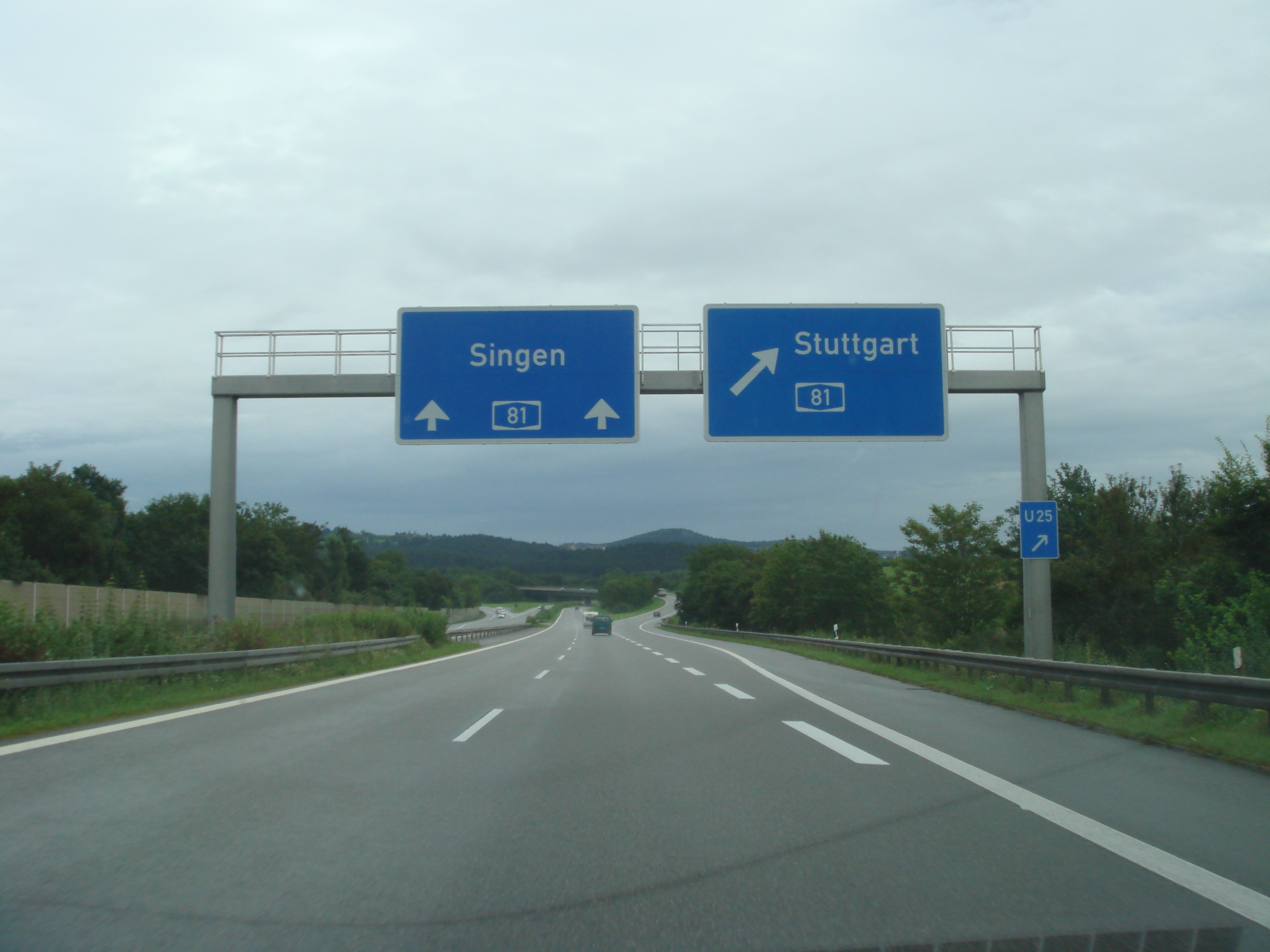 Vue de l'autoroute allemande 81 au niveau du Dreieck Bad Dürrheim